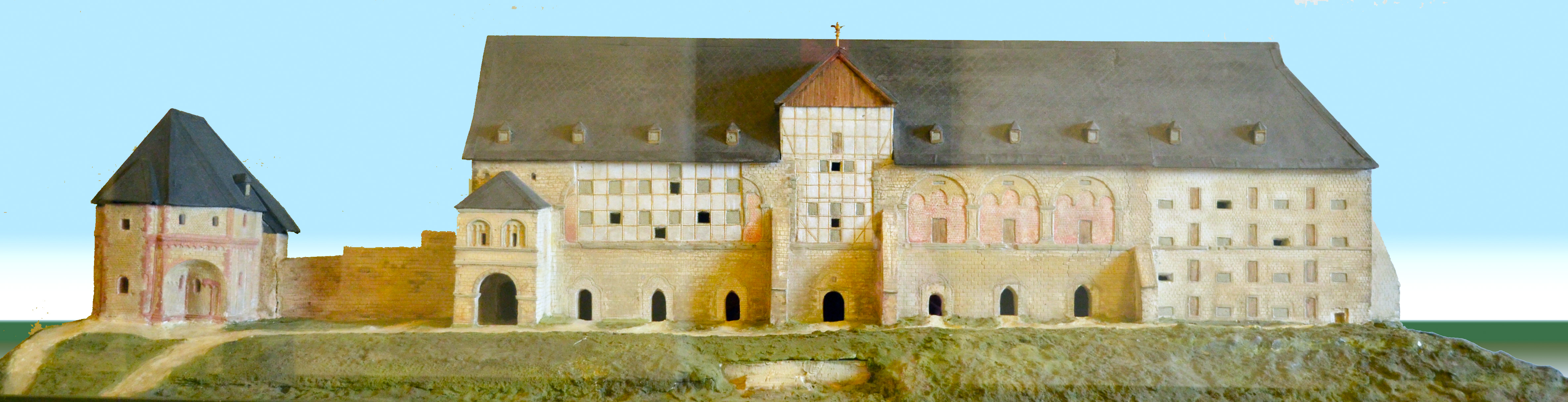 Modell der Kaiserpfalz vor der Restaurierung im 19. Jhd, Modell befindet sich in der Ausstellung.